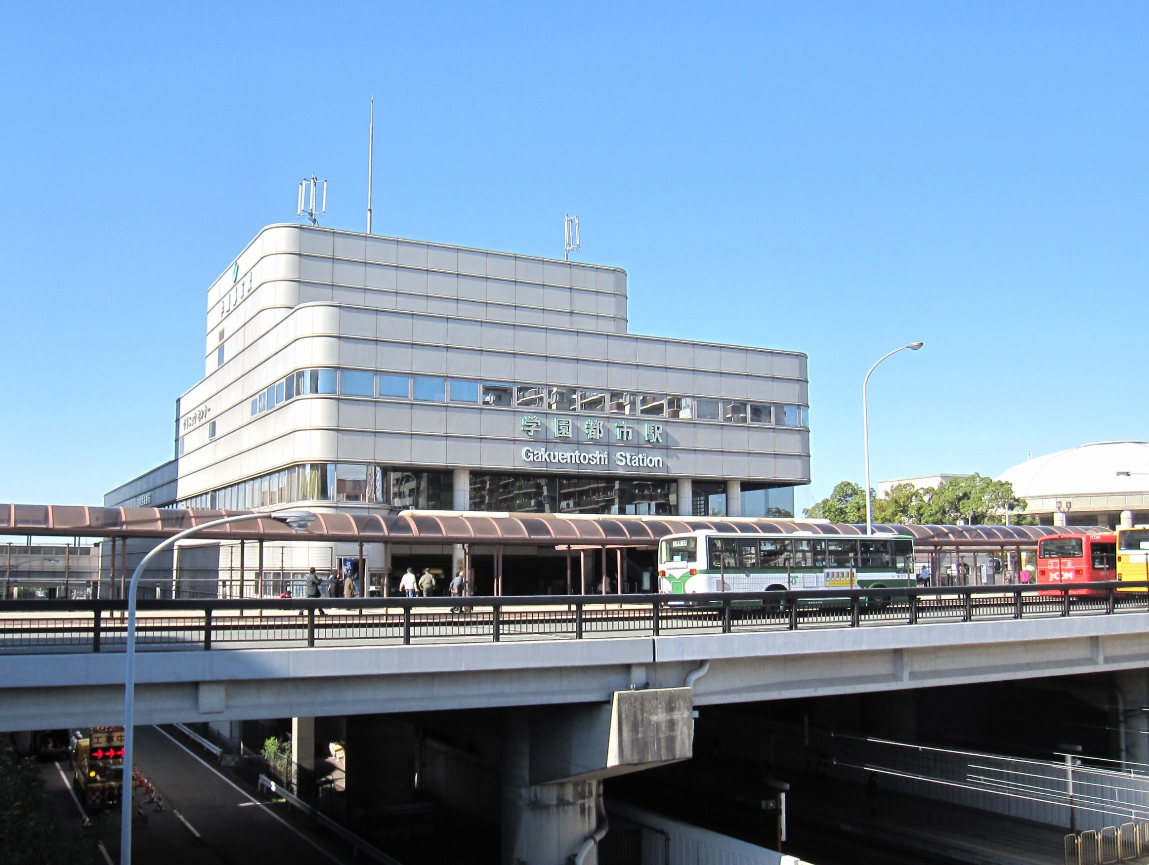 神戸市営地下鉄学園都市駅